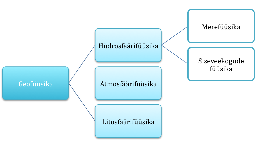 Geofüüsika hõlmab atmosfääri-, hüdrosfääri- ja litosfäärifüüsikat.